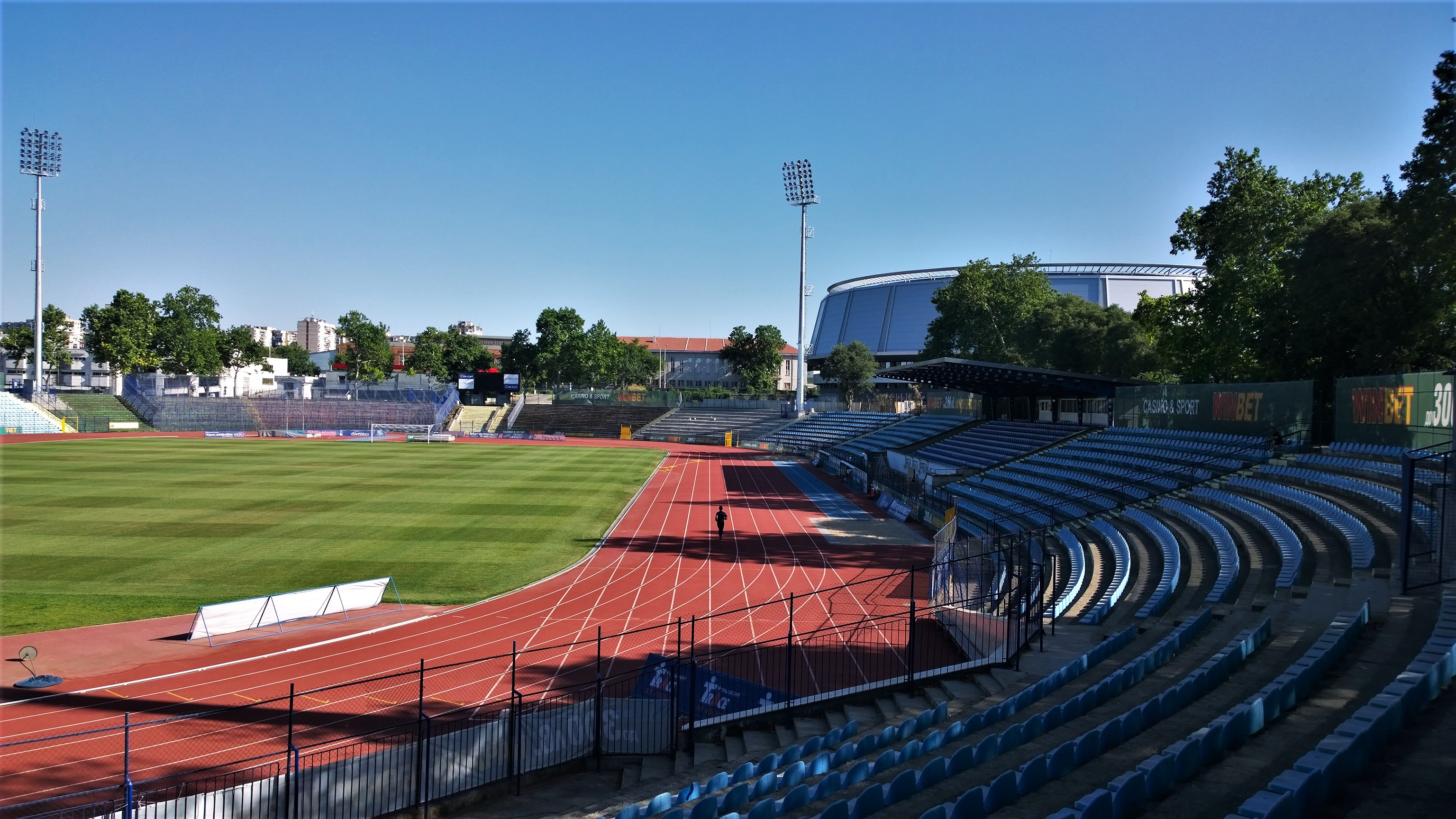 Градски стадион в Русе 2017